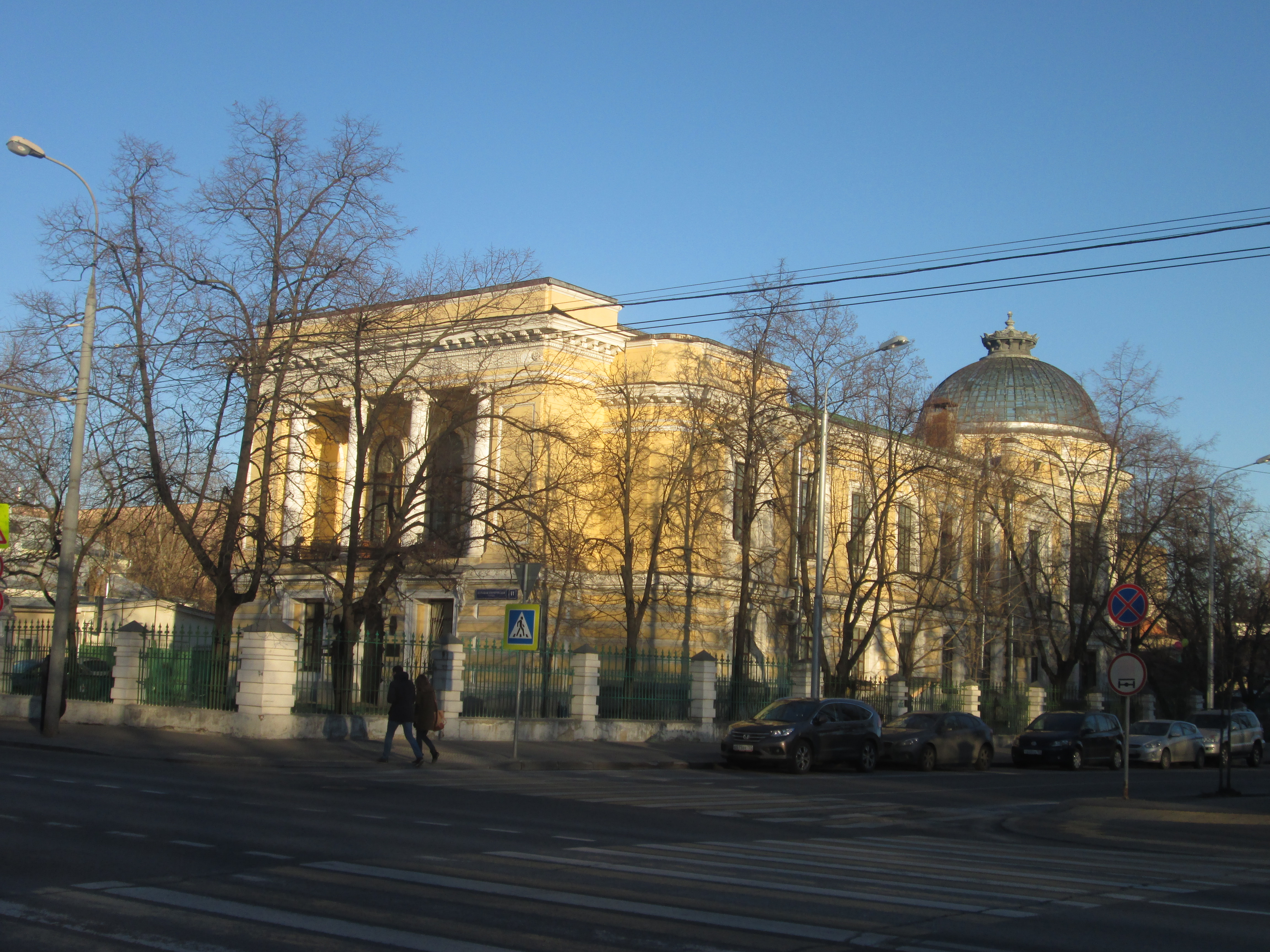 Здание института: Пироговская Б. ул., дом 11, строение 1, Хамовники, Центральный округ, Москва